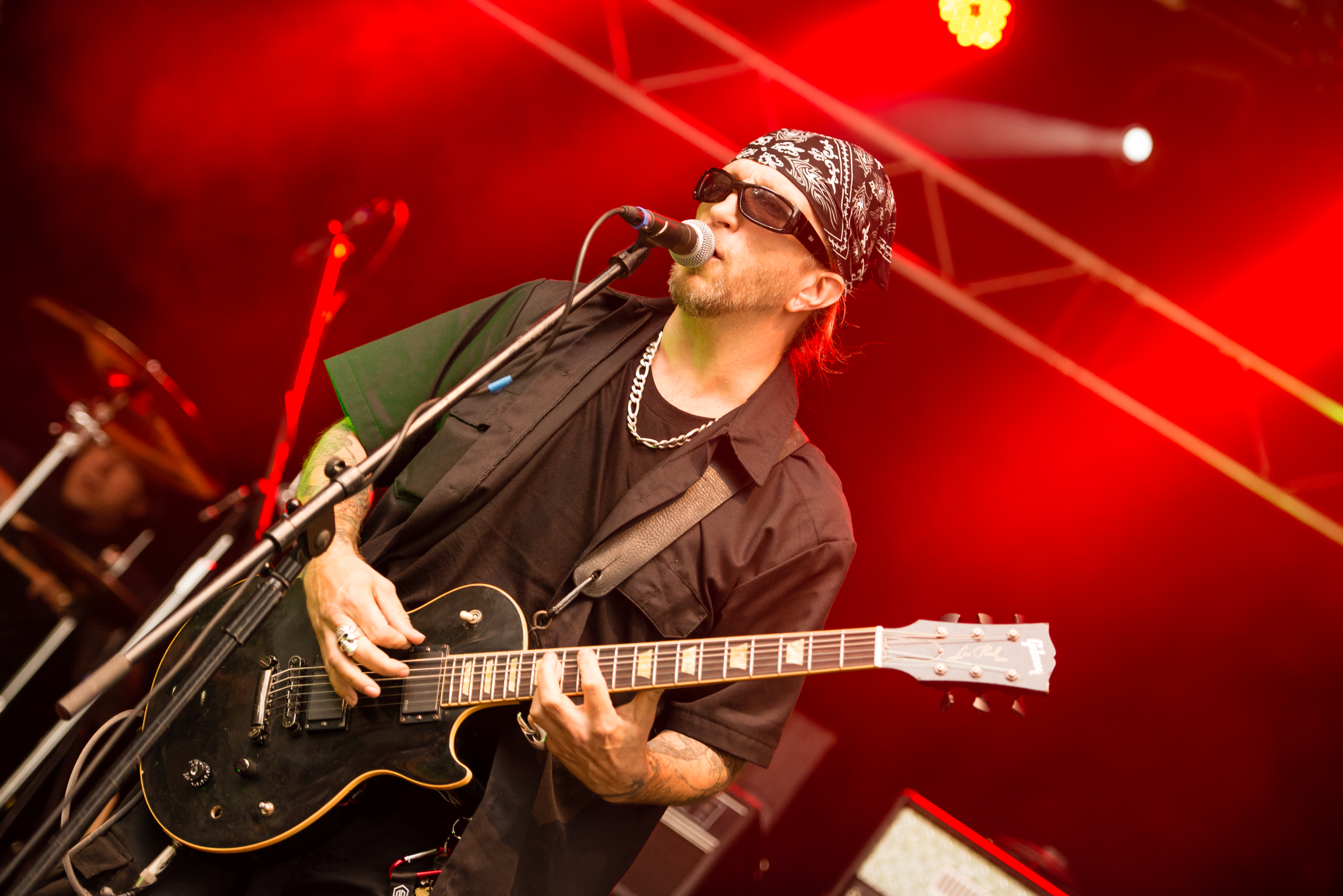 'Nord Open Air 2014 - Essen': 'Biohazard'